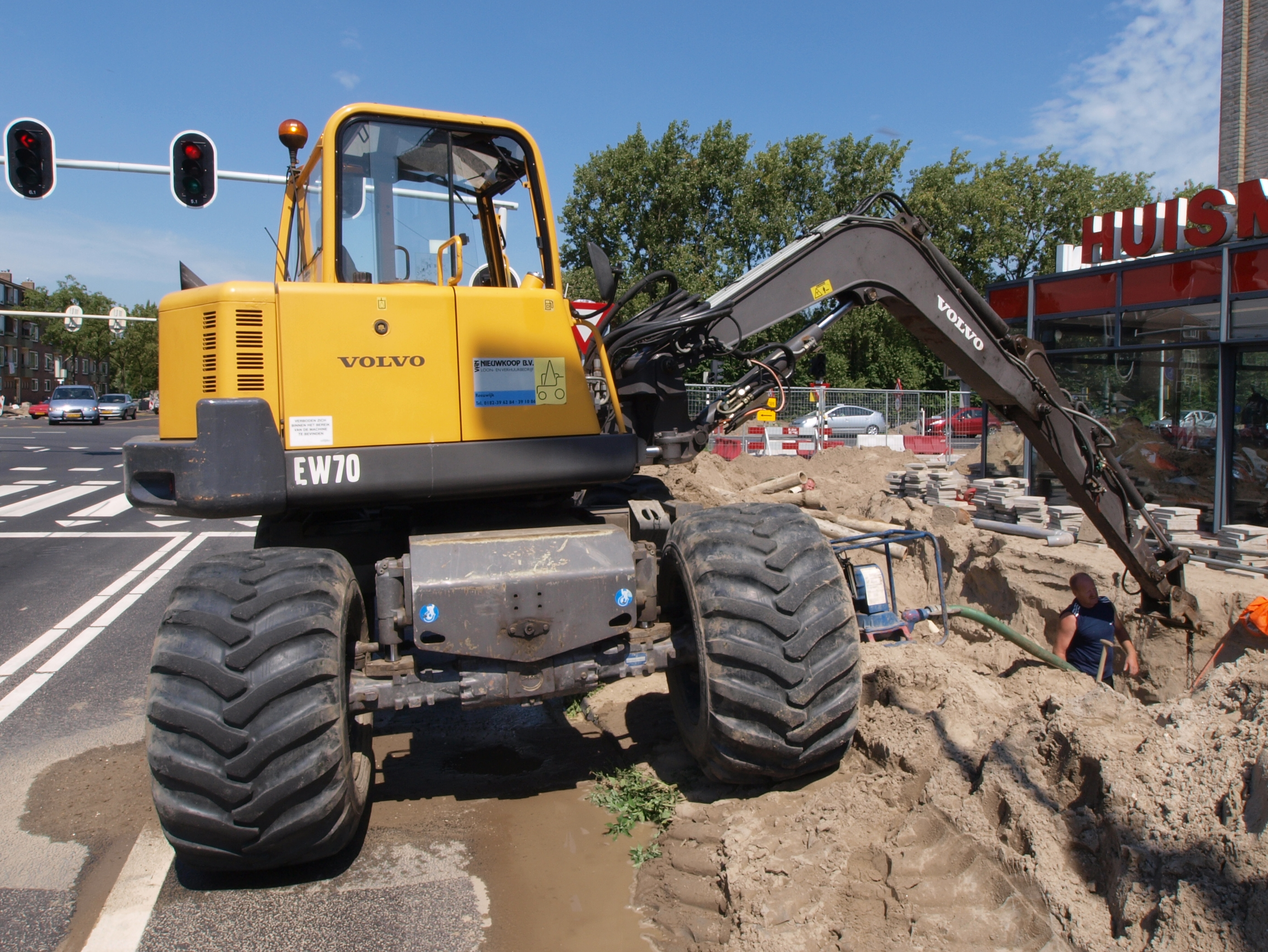 Volvo EW70.